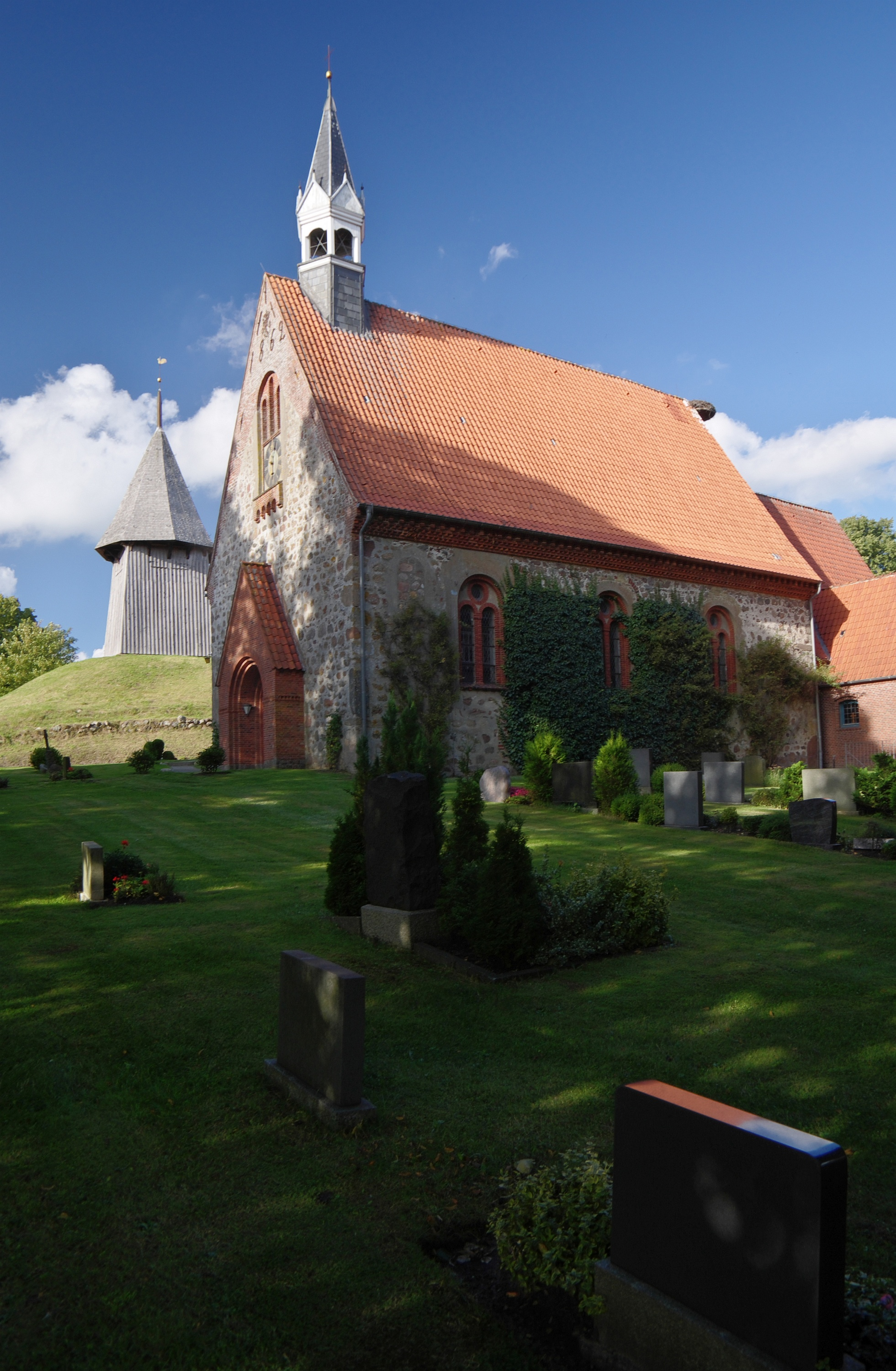 Schwabstedt, Schleswig-Holstein, Deutschland. Kirche und Glockenturm